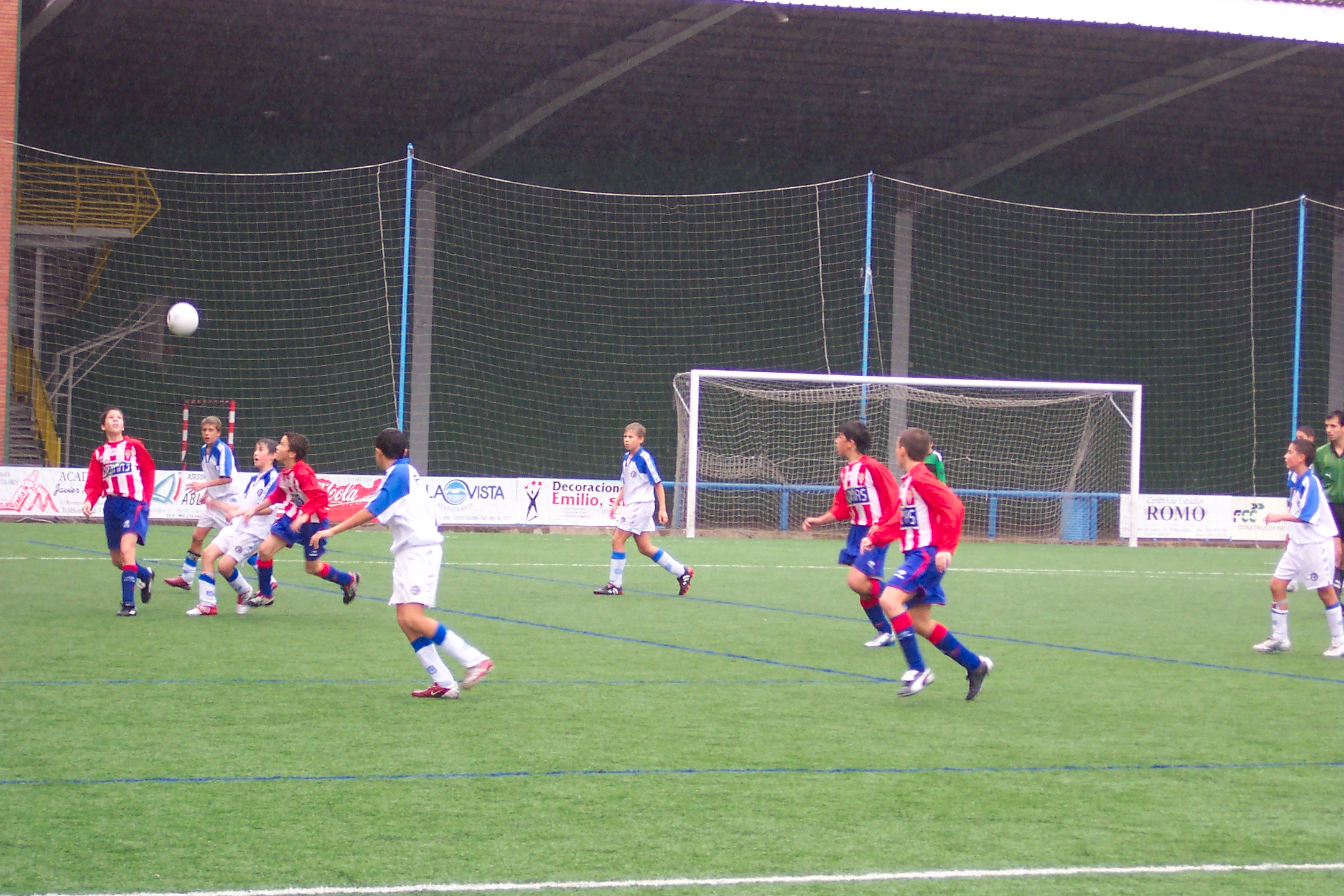 un partido Inmaculada-Sporting. Gijon, 2005.